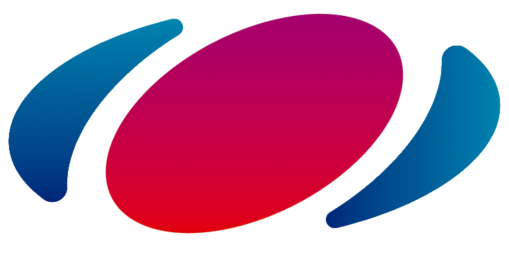 Logotipo de Red Guaraní, implementado, desde el 29 de Junio de 2015